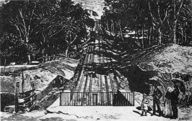 Quadro do Elevador do Bom Jesus, Braga, no século XIX.